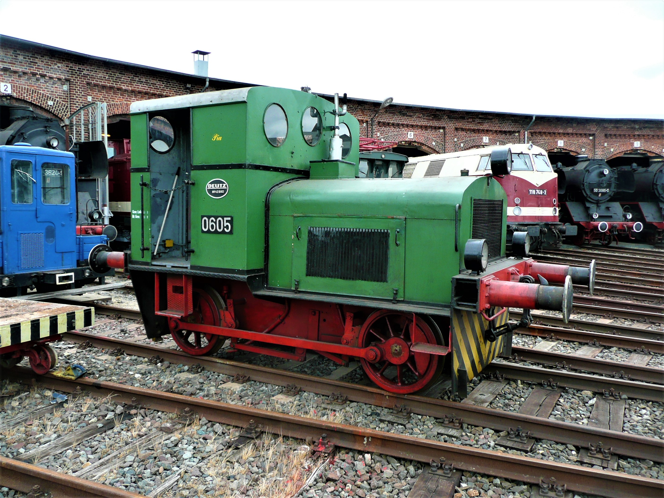 erhaltene Lokomotive KHD OMZ 122 R (KHD Fabriknummer 42990, 1942) im historischen Lokschuppen Wittenberge